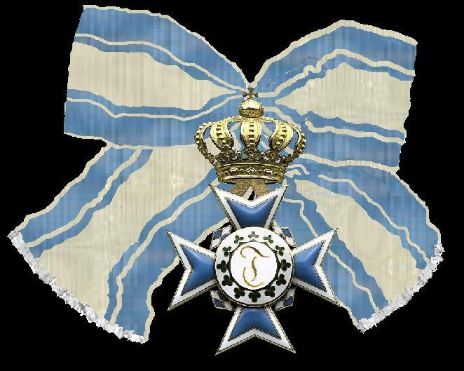 Een gescand kruis uit mijn verzameling. Het lint is geschilderd... Jammer genoeg was er geen afbeelding van een lint te vinden. 21 jun 2006 16:06 (CEST)